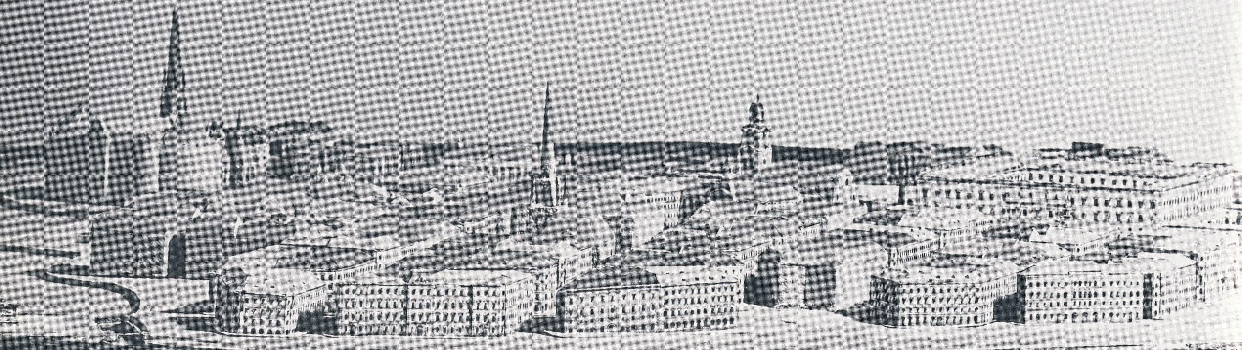 Förslag till sanering av Gamla stan, Stockholm, modell med vy mot Skeppsbron